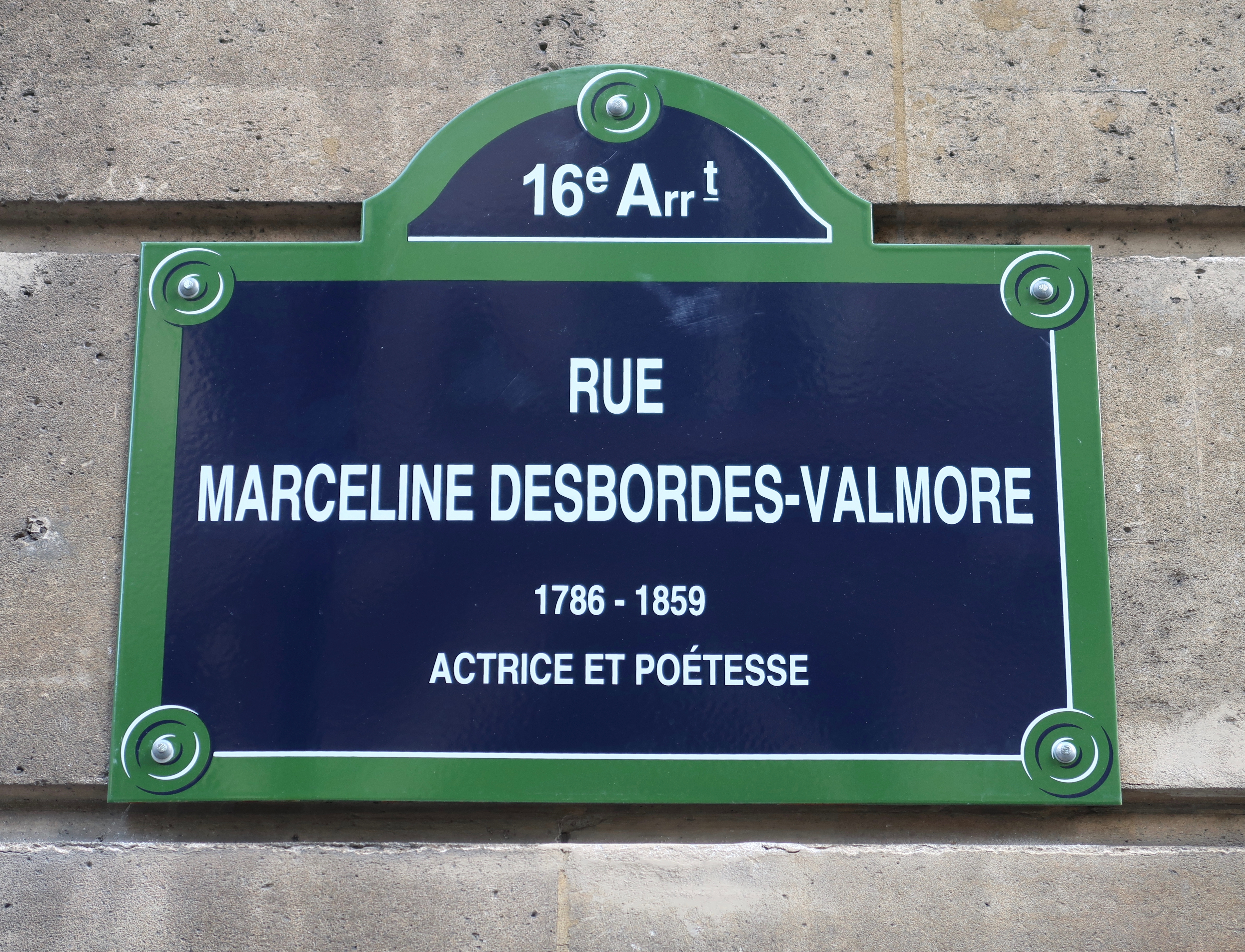 Plaque de la rue Marceline-Desbordes-Valmore (Paris, 16e).